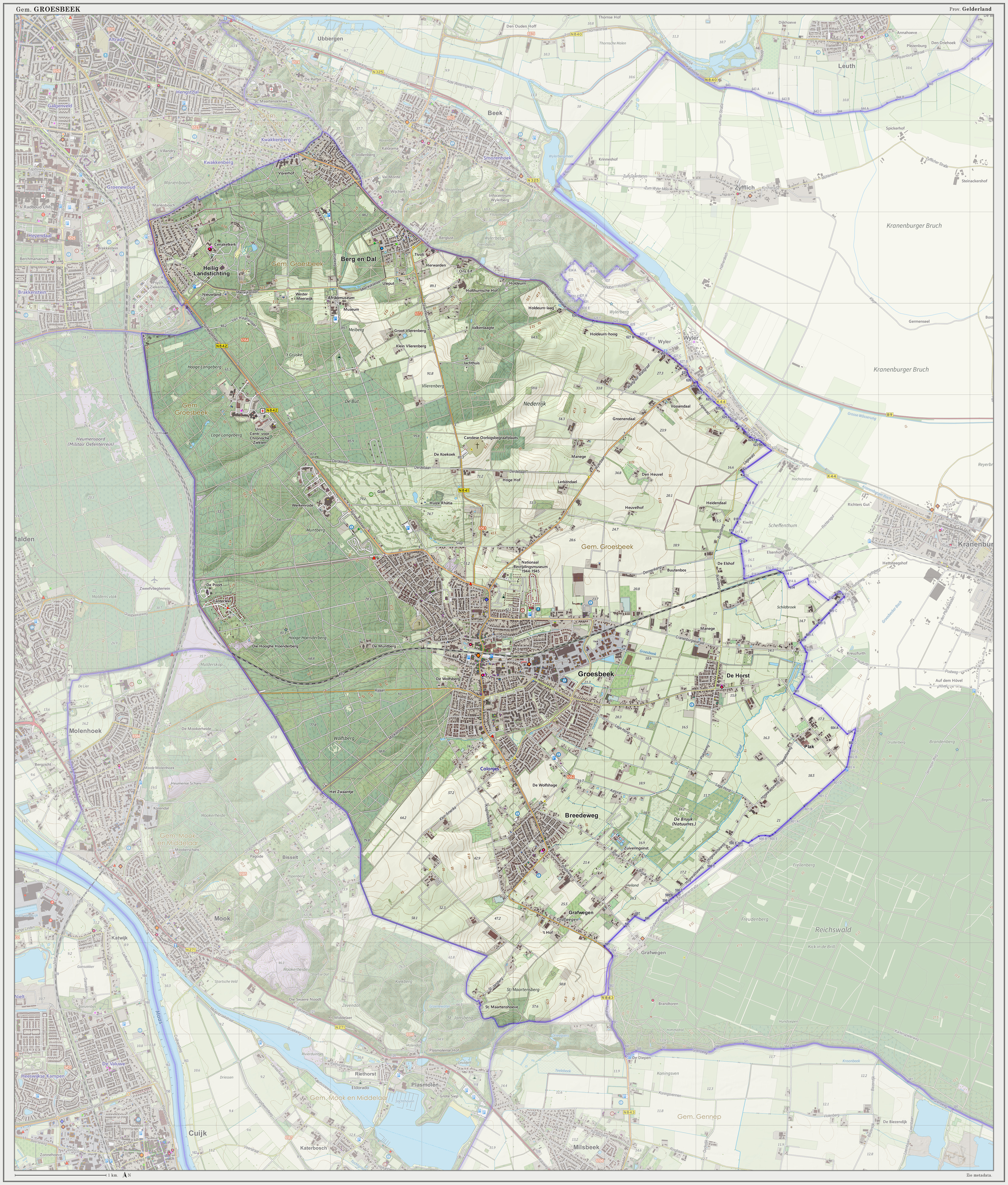 Topografische kaart van (gemeente) per maart 2014. Resolutie: 300 pixels/km. Kaartbeeld samengesteld uit de open geodata van de Top10NL en Top25namen (Basisregistratie Topografie, Kadaster 28-feb-2014), Creative Commons BY licentie. Gebouwvlakken uit open geodata BAG extract (8-mrt-2014). Wegen uit de OpenStreetMap (8-mrt-2014), OpenStreetMap community. Schaduwreliëf uit de Actuele Hoogtekaart AHN2 (8-mrt-2014). Samenstelling en kleurenschema: Jan-Willem van Aalst, met QGIS2. Zie ook de Legenda.